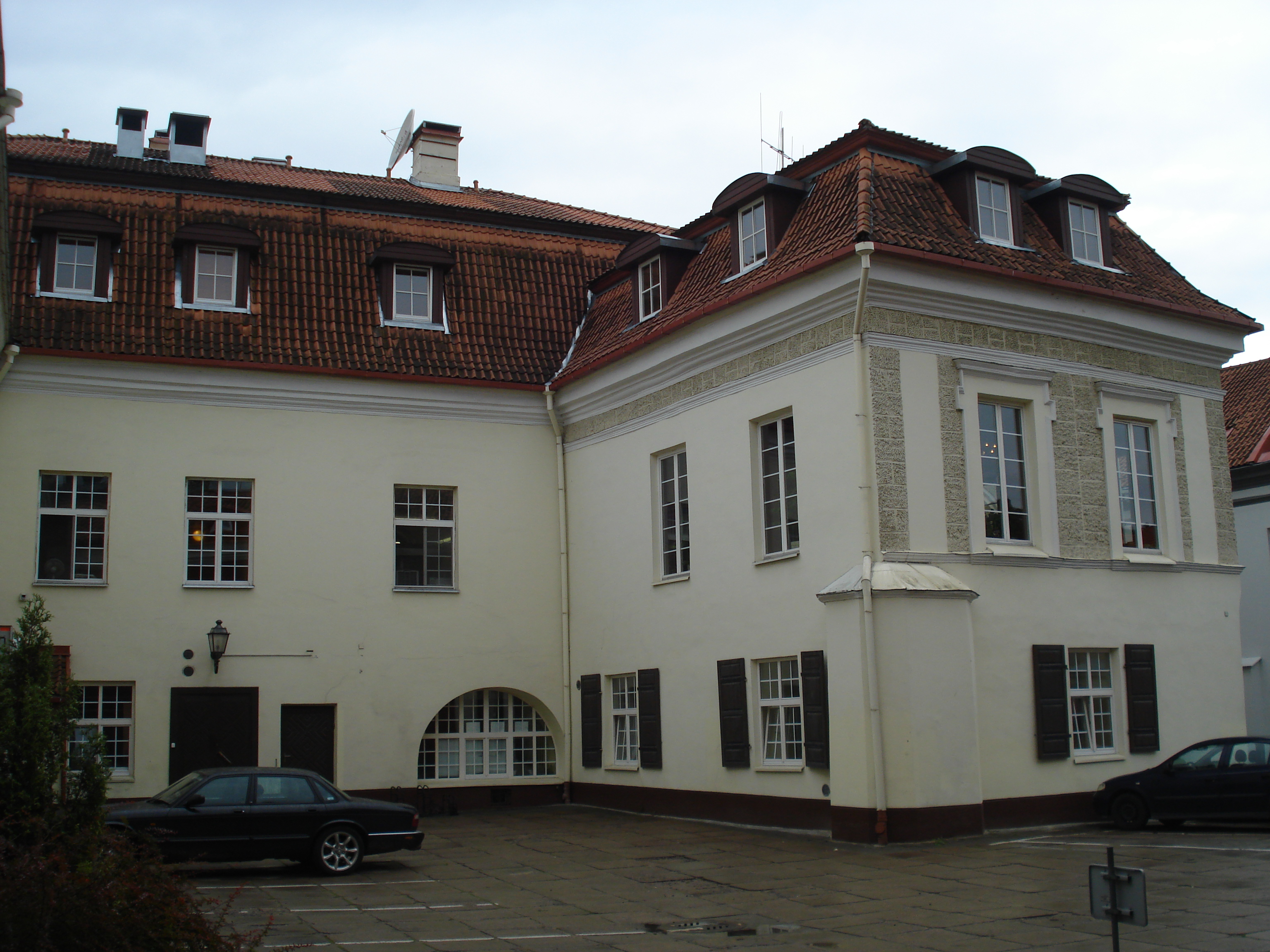 Olizary Palace in Vilnius